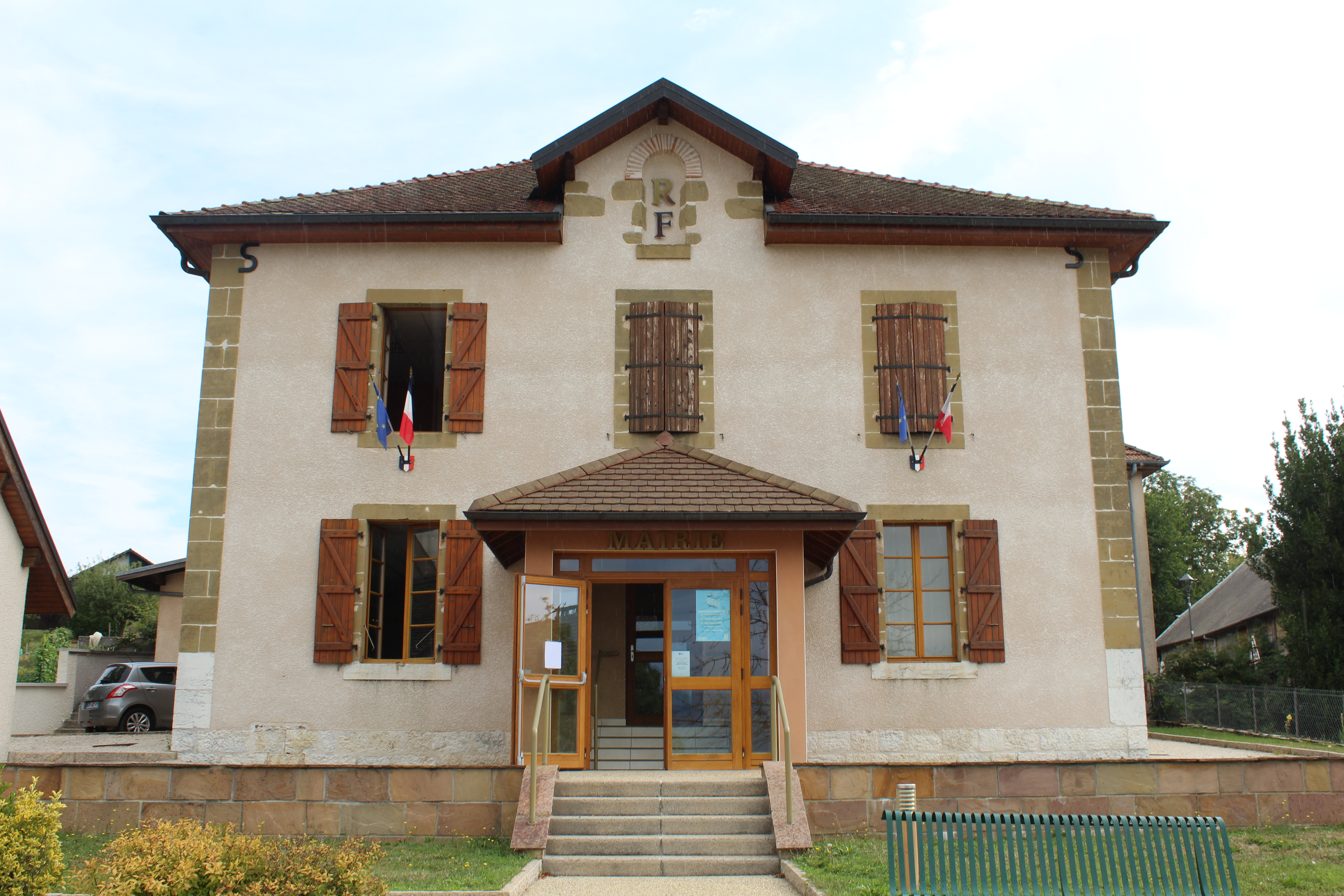 Mairie de Thusy.